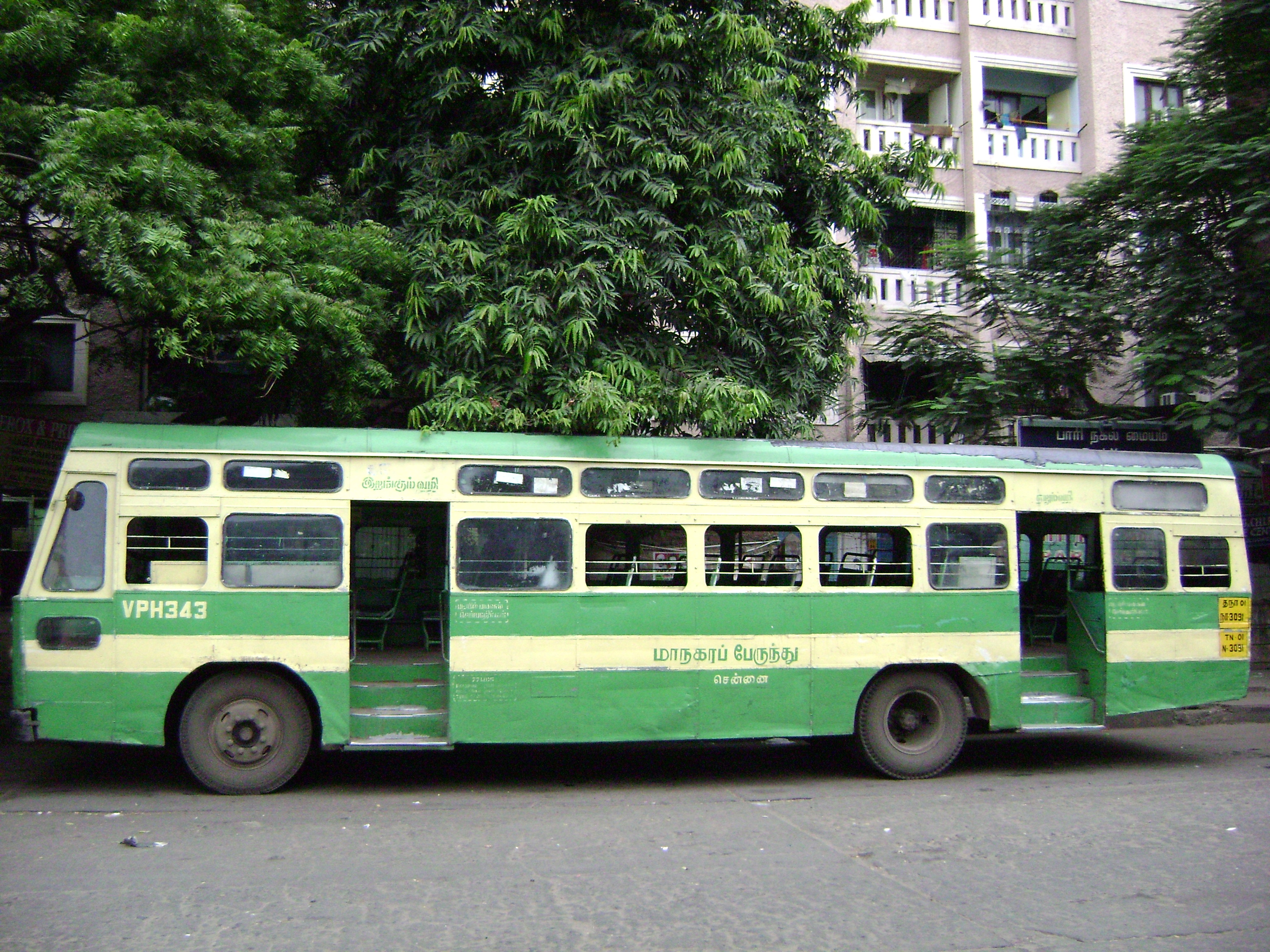 சென்னை மாநகராட்சி போக்குவரத்து கழகத்தின் பேருந்து